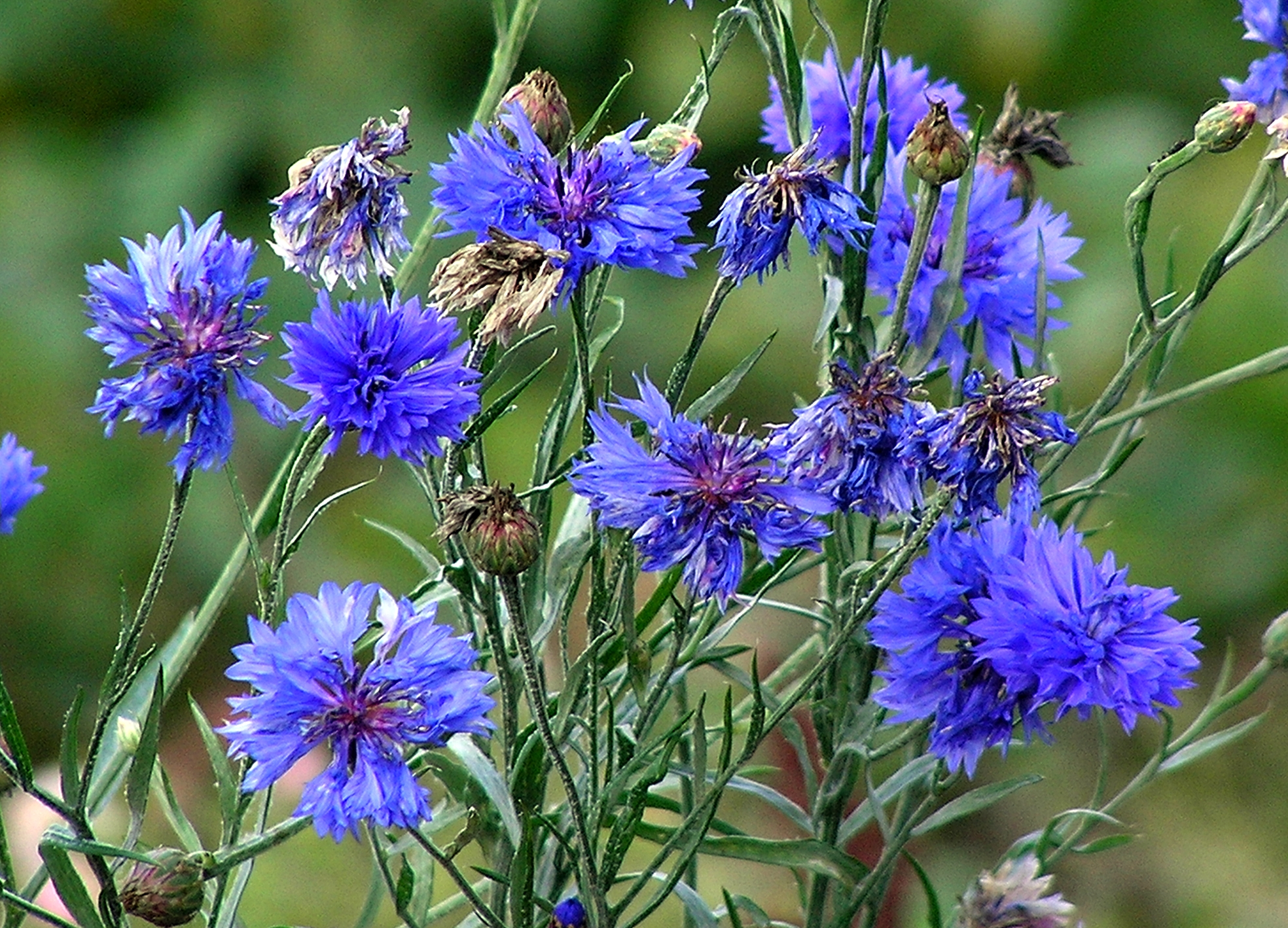 Rukkilill